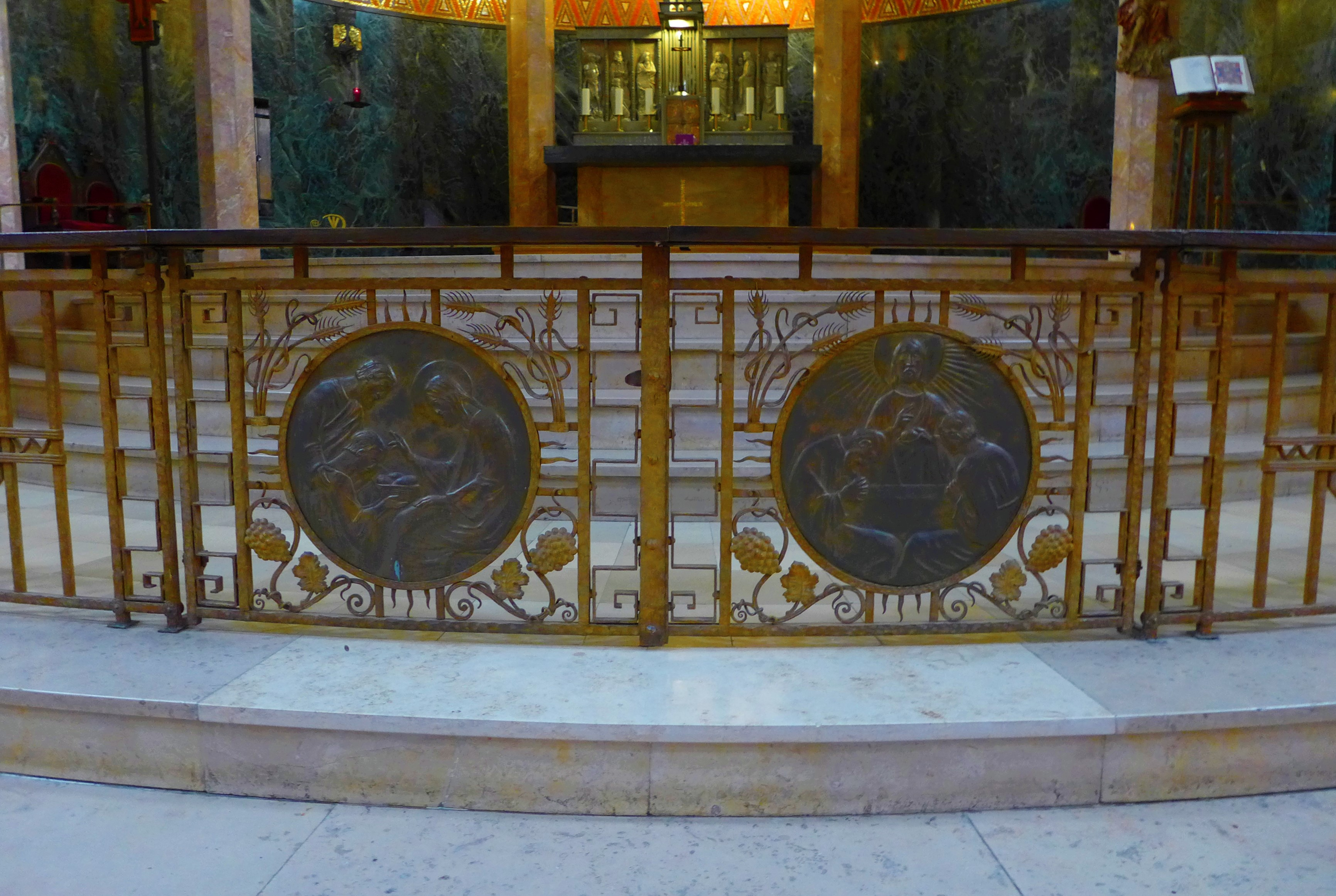 Christkönig-Kirche (Saarbrücken), Kommunionbank